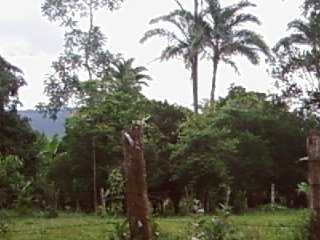 Végétation typique sur le territoire de la municipalité d'Acacias